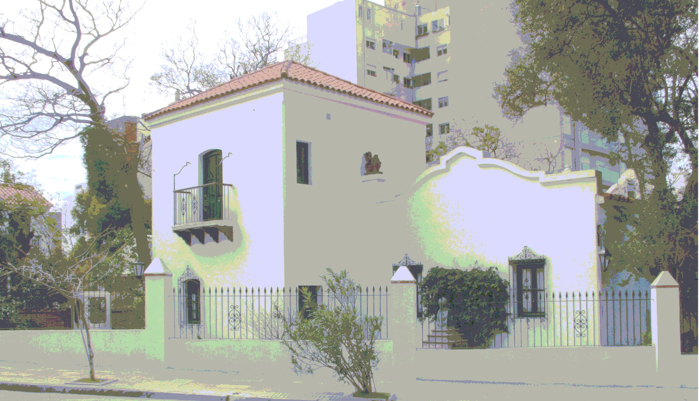 Casa de Juan Zorrilla de San Martín, poeta uruguayo, en Montevideo.